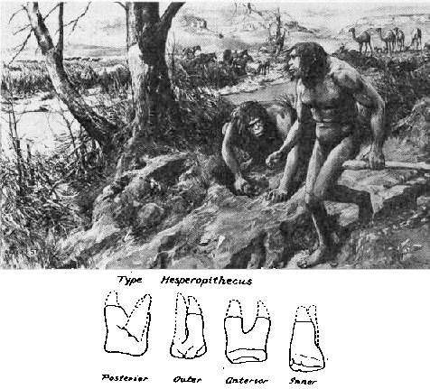 Représentation imaginaire de l'Homme du Nebraska